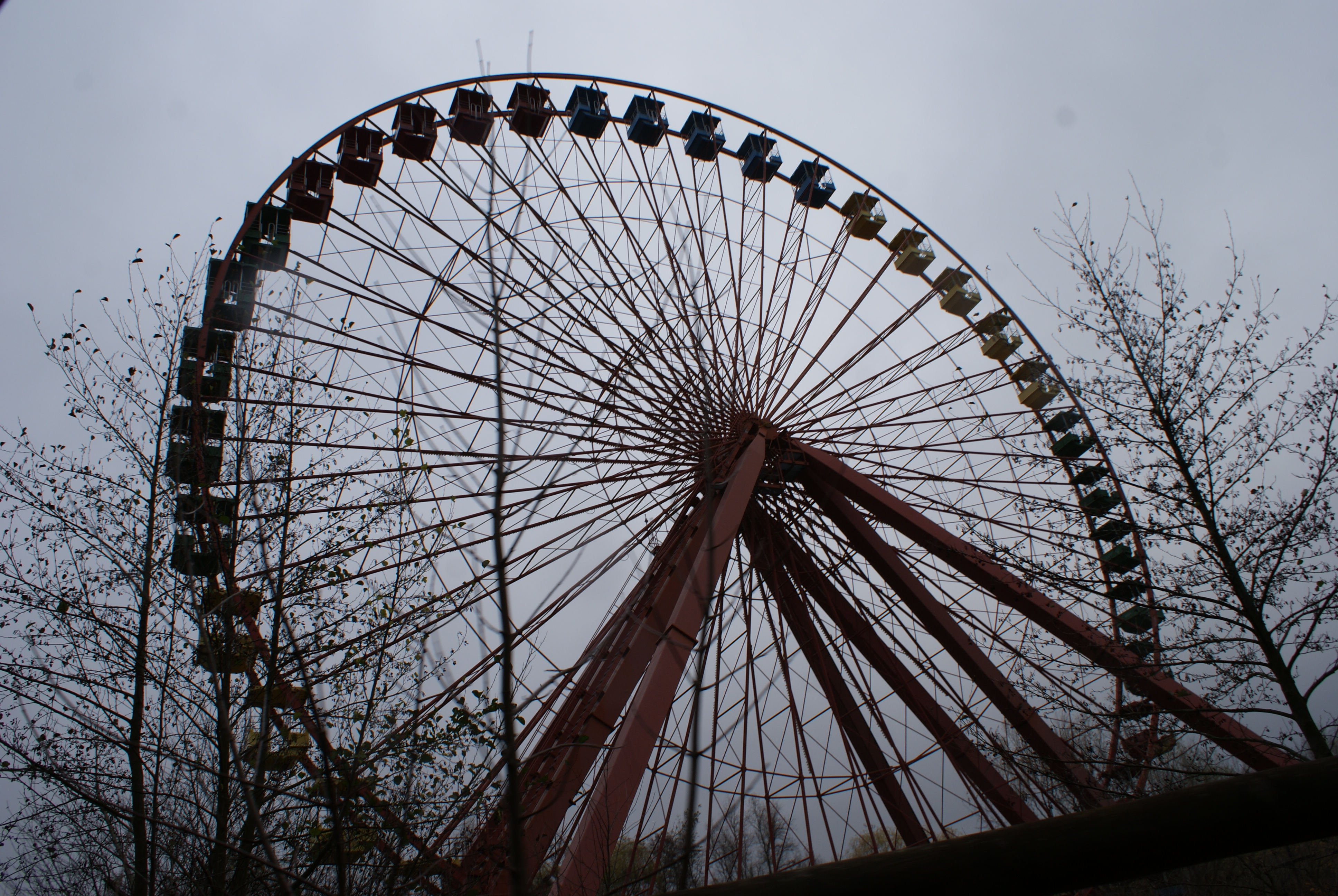 Riesenrad im ehemaligen Spreepark im Plänterwald Berlin (November 2013)